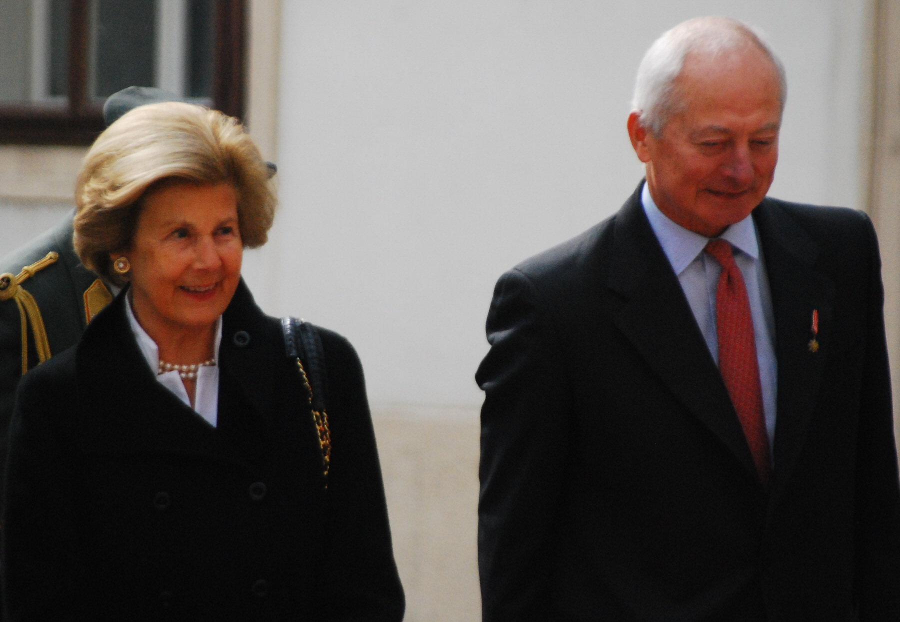 Fürst Hans-Adam II. von und zu Liechtenstein und seine Frau anlässlich eines Staatsbesuchs im Inneren Burghof in Wien